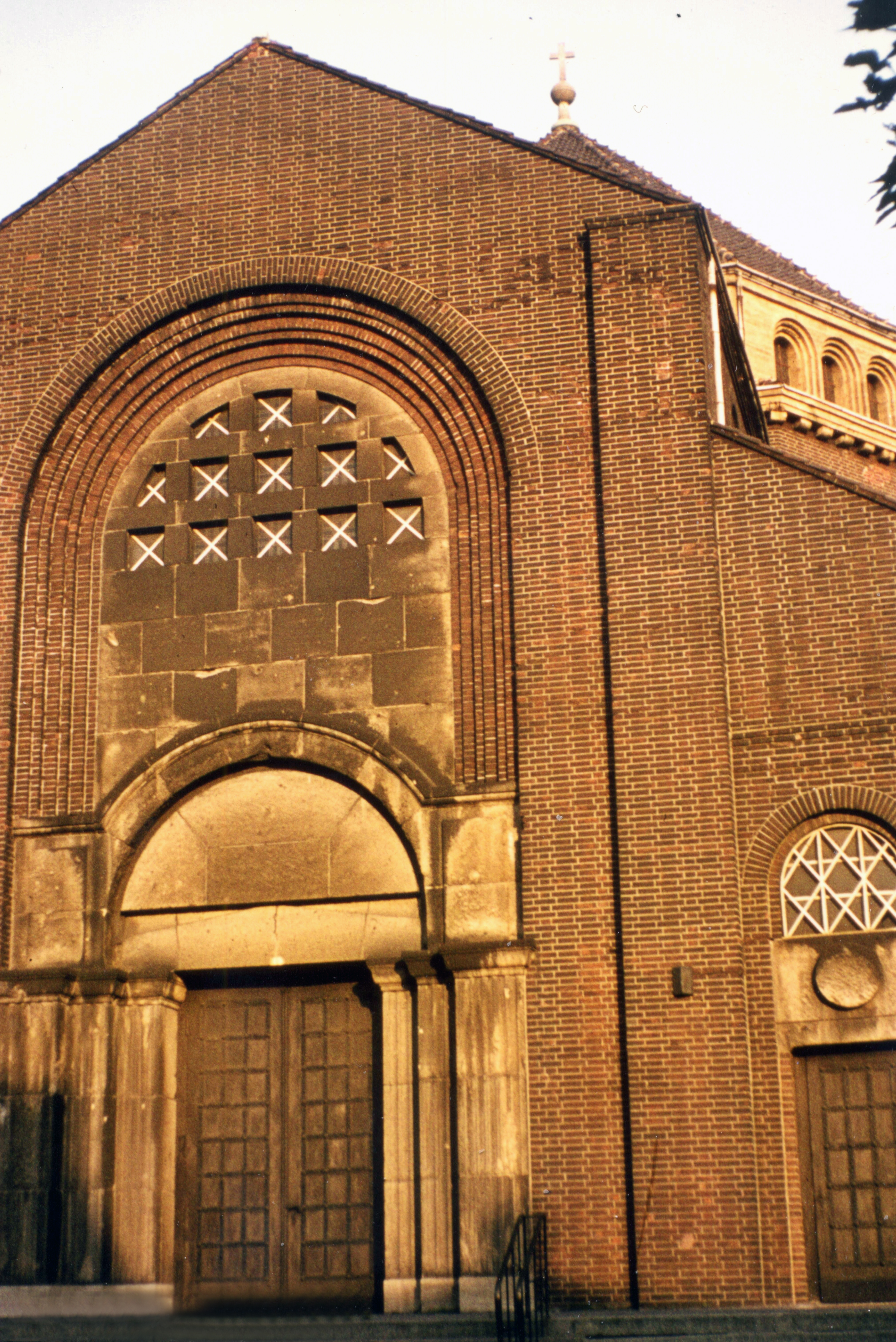 Église Sainte-Croix à Gladbeck